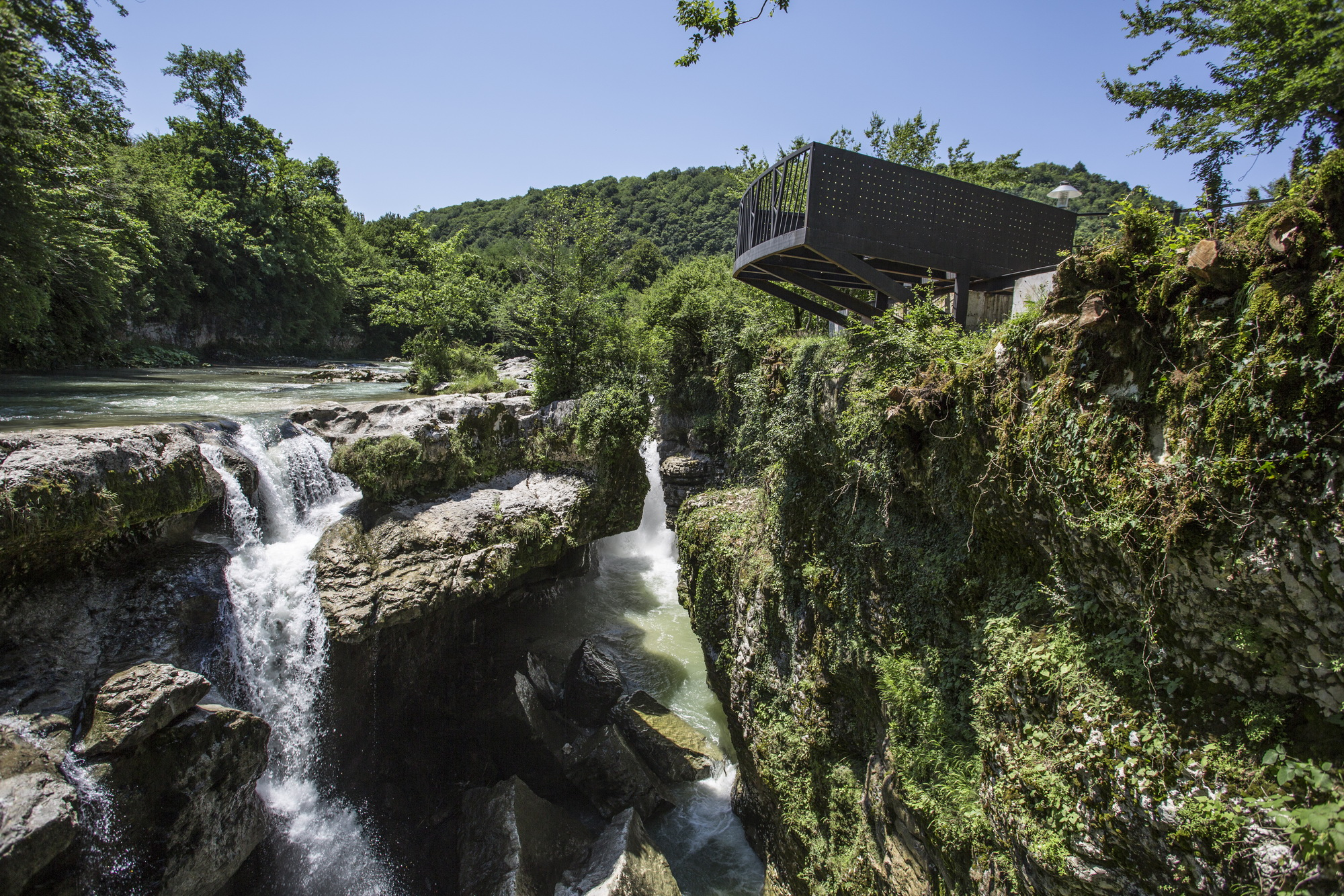 მარტვილის კანიონის ბუნების ძეგლი. ღირსშესანიშნაობა: ბუნების ძეგლი წარმოადგენს მდინარე აბაშის მიერ აბდათის კირქვული ქანებით აგებულ ანტიკლინში, კანიონისებურად გაჭრილ ხეობას. კანიონის სიგრძე 2400 მ-ია, ჩაჭრის სიღრმე 20-30 მ, ხოლო სიგანე 5-10 მ. კანიონში ორ ადგილას არის შენახული კირქვის ბუნებრივი ხიდები, რაც იმის მანიშნებელია, რომ აქ ოდესღაც კარსტული მღვიმე ჩამოიშალა. გარდა ამისა, კანიონის შუა წელში წარმოიშობა 12-15 მ სიმაღლის ვარდნის მცირე ჩანჩქერები. ერთი მონაკვეთი გამოირჩევა განსაკუთრებული სილამაზით. ეს არის ოფუცხოლე, რომელიც ცნობილია “დადიანების საბანაოს” სახელით. აქ ჩასასვლეად ბილიკი კირქვის დიდი კვადრებისგან აშენებული კიბეს ჩაუყვება. გადმოცემის თანახმად, სწორედ ამ კიბით დადიოდნენ გიორგი ჭყონდიდელი და დავით აღმაშენებელი. მიმდებარე კირქვოვან კლდეებზე განვითარებულია კოლხური ტყისთვის დამახასიათებელი ფლორა, თავისი უნიკალური წარმომადგენლებით, აქ გვხვდება: დათვის თხილი, კოლხური ბზა, უთხოვარი და სხვა. მრავლადაა სხვადასხვა სახეობის ხავსი, გვიმრანაირები. მდებარეობა: მარტვილის მუნიციპალიტეტი, სოფ. გაჭედილი, მდ. აბაშის ხეობა, მარტვილი-ჩხოროწყუს ცენტრალური საავტომობილო გზის პირას, 210 მეტრი ზღვის დონიდან. კოორდინატები: N42 27.394 E42 22.557 მისასვლელი გზა: ბუნების ძეგლთან ყველაზე ახლომდებარე მსხვილი დასახლებული პუნქტია ქ. მარტვილი. თბილისიდან მარტვილი დაშორებულია 280 კმ-ით; ხანგრძლივობა - 4 სთ; ქ. მარტვილიდან - გოჭკადილის კანიონის ბუნების ძეგლი - 5,5 კმ; ხანგრძლივობა - 10 წთ